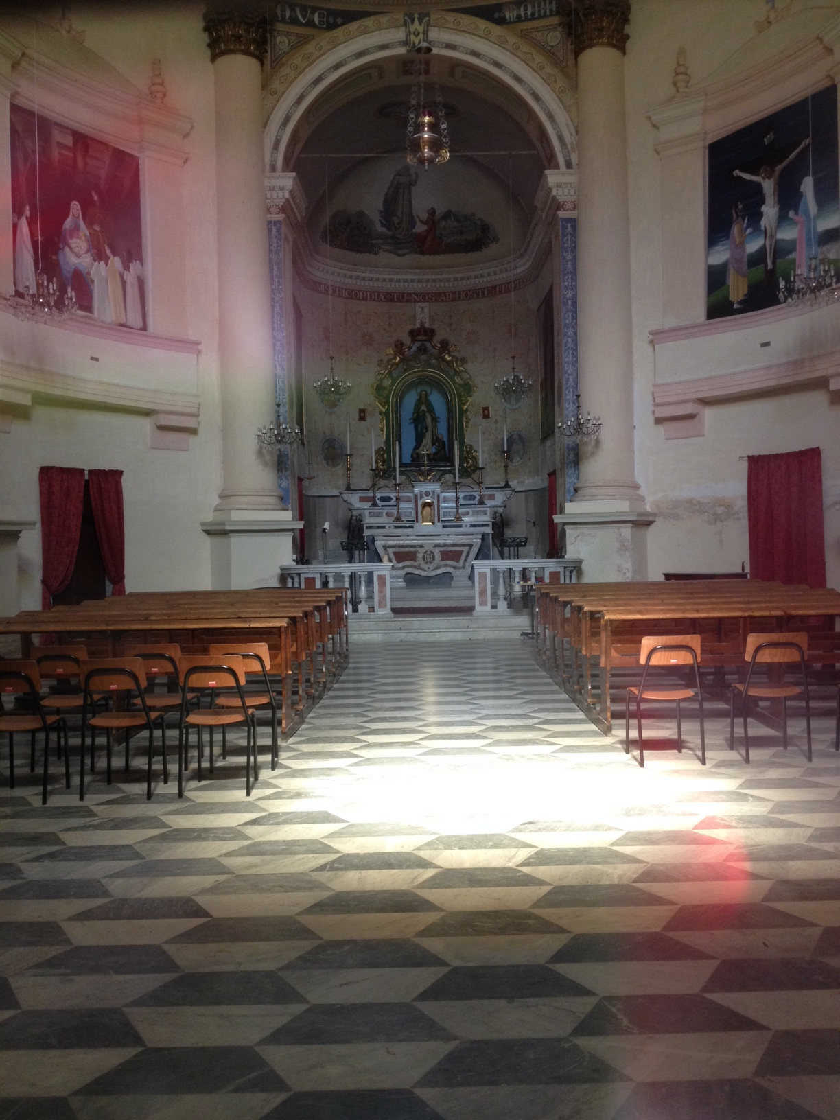 Santuario Santa Maria Ausiliatrice, Orco Feglino (SV) Italy